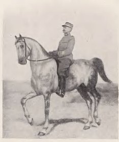 L'écuyer français du Cadre noir Etienne Beudant et son cheval Anglo-arabe Nethou II